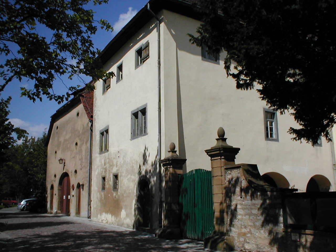 Zehntscheuern am Wormser Hof, Bad Wimpfen